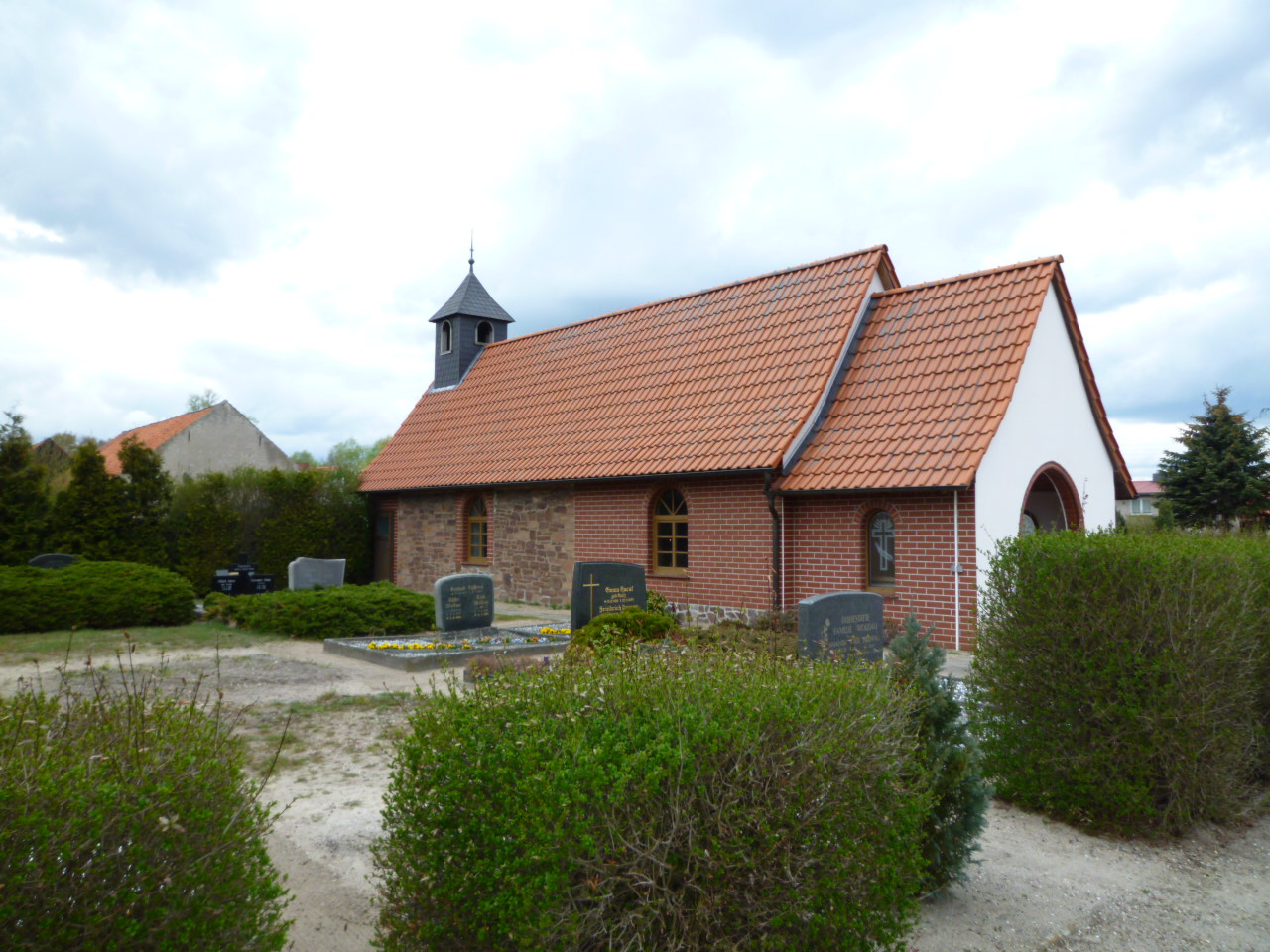 Calvörde-Mannhausen, Friedhofskapelle, Südansicht